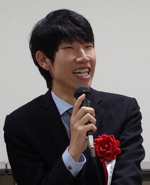 佐々木大地五段。2019年10月19日、棋士会みやぎ将棋フェスティバルにて。